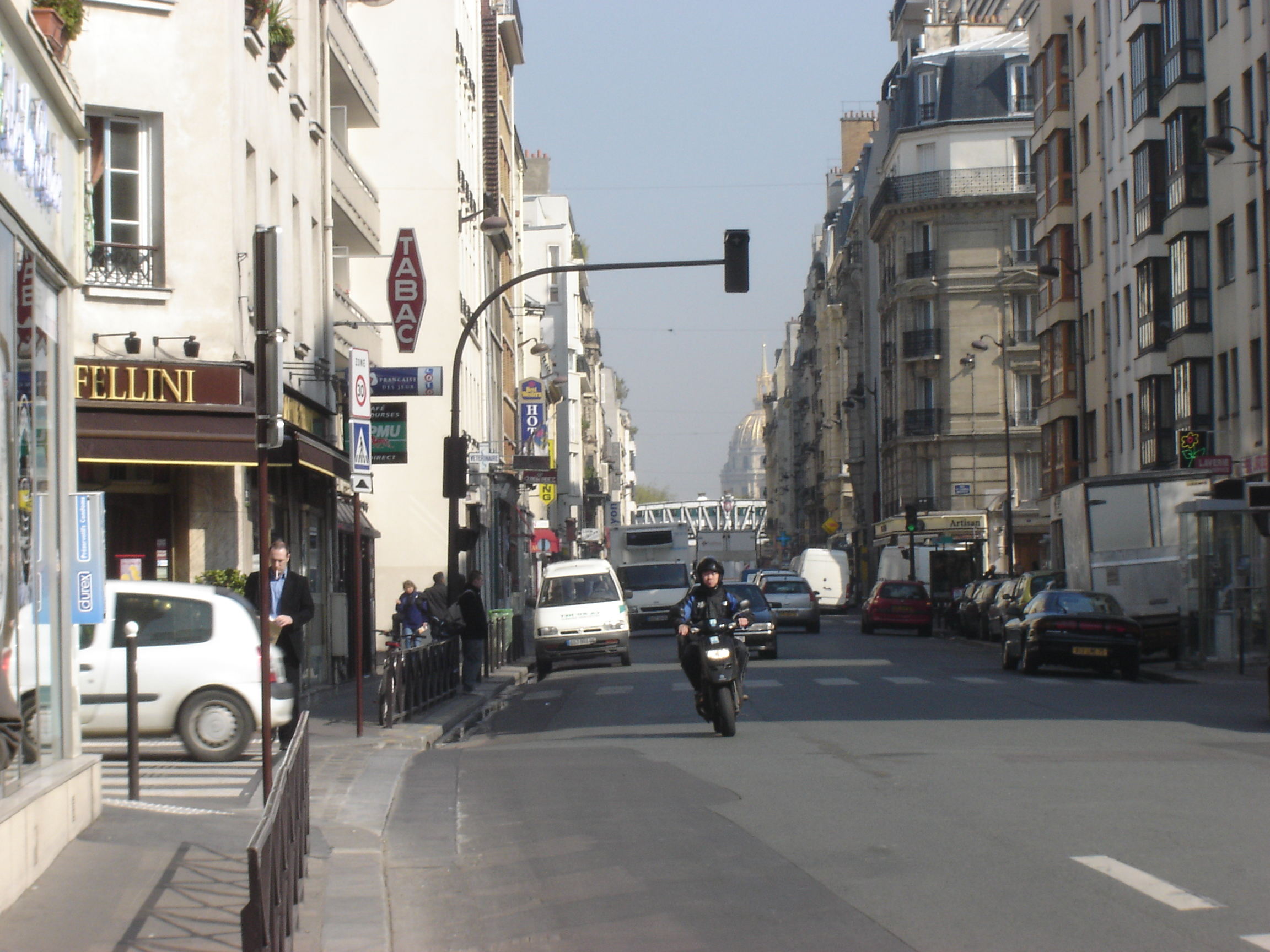 vue de la rue de la Croix-Nivert, dans le 15e arrondissement de Paris, en regardant vers la place Cambronne, le métro aérien et le Dôme des Invalides